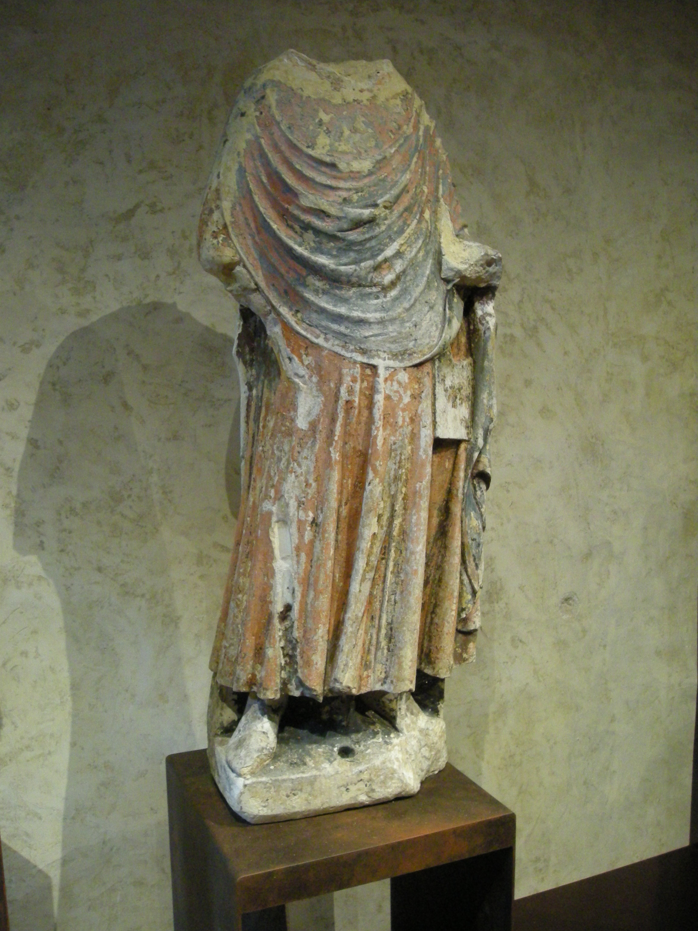 Statue en calcaire de Saint Jacques le Majeur, en provenance de l'église d'Amigny, présentée dans le cadre de l'exposition "Fragments d'Histoire" à l'abbaye de Hambye (Normandie)